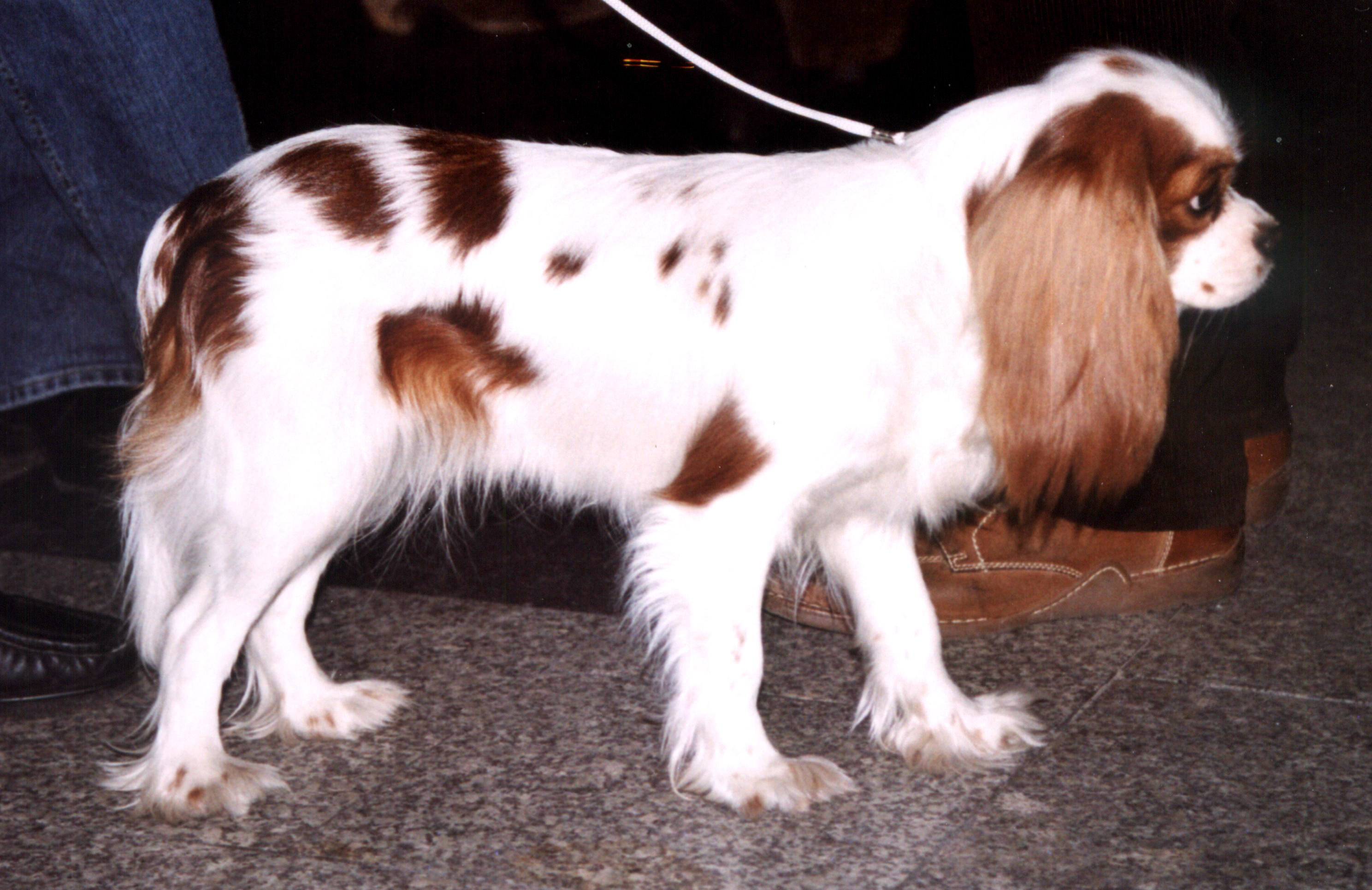 Cavalier_king_charles_spaniel na wystawie w Katowicach